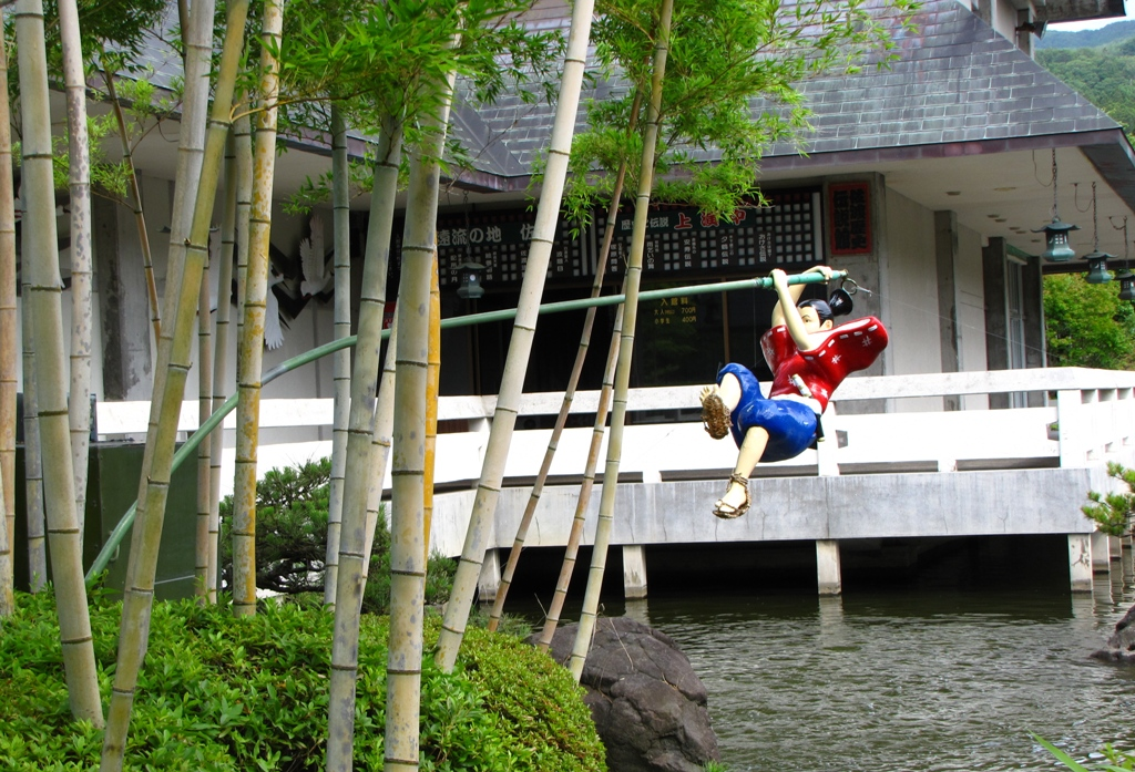 佐渡歴史伝説館入口付近